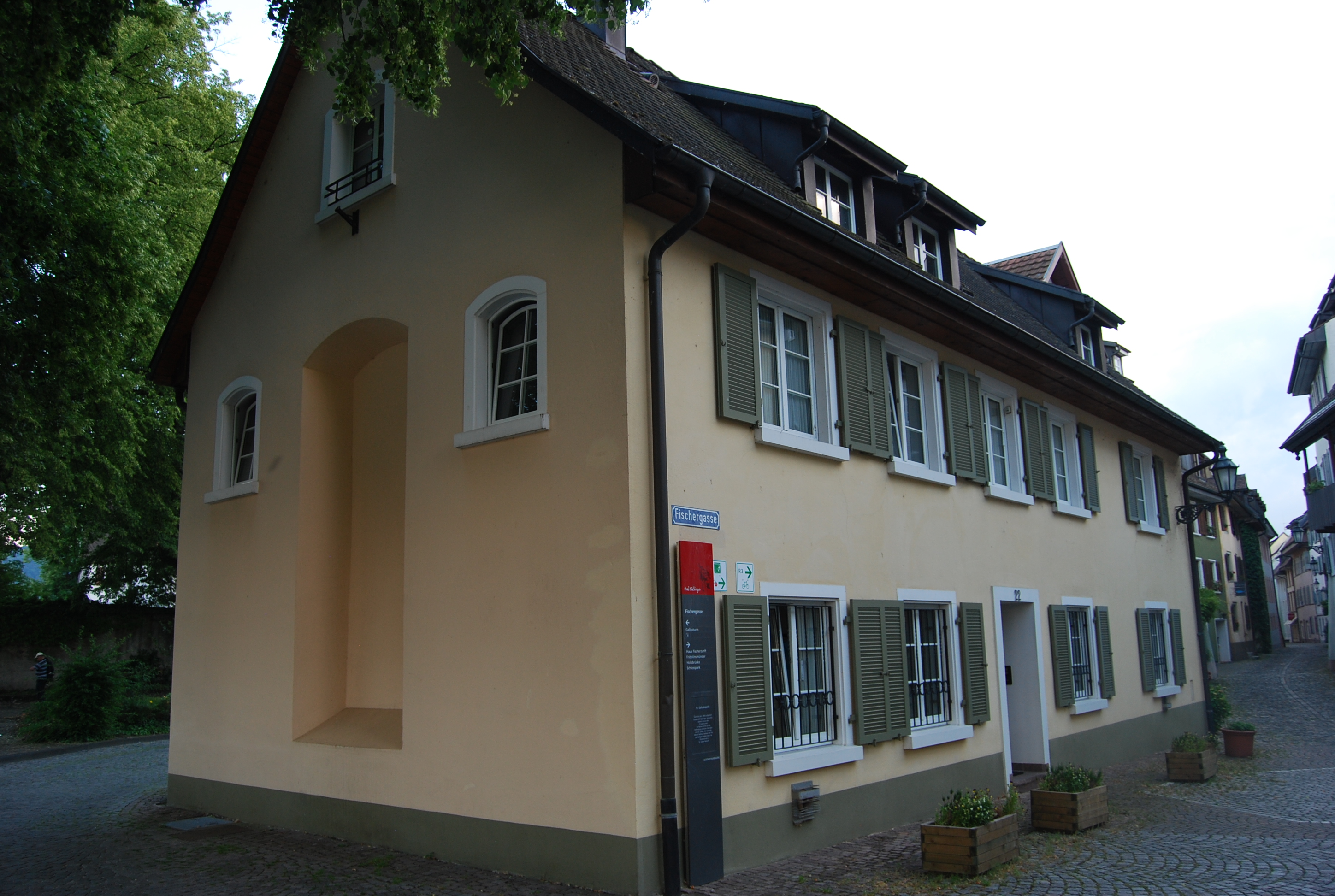 Galluskapelle des ehemaligen Damenstift Säckingen